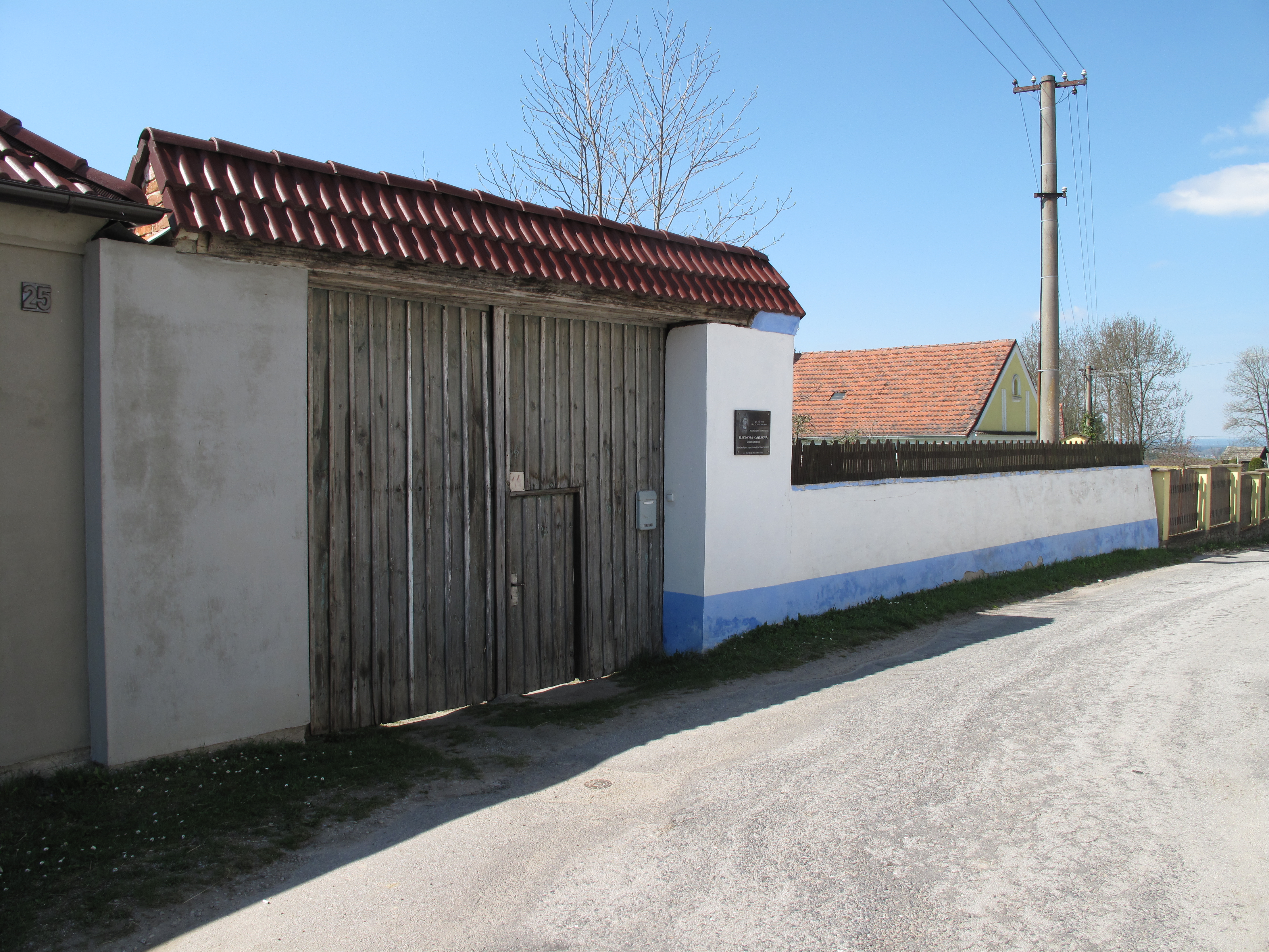 Vrata v Modré Hůrce. Okres České Budějovice, Česká republika.